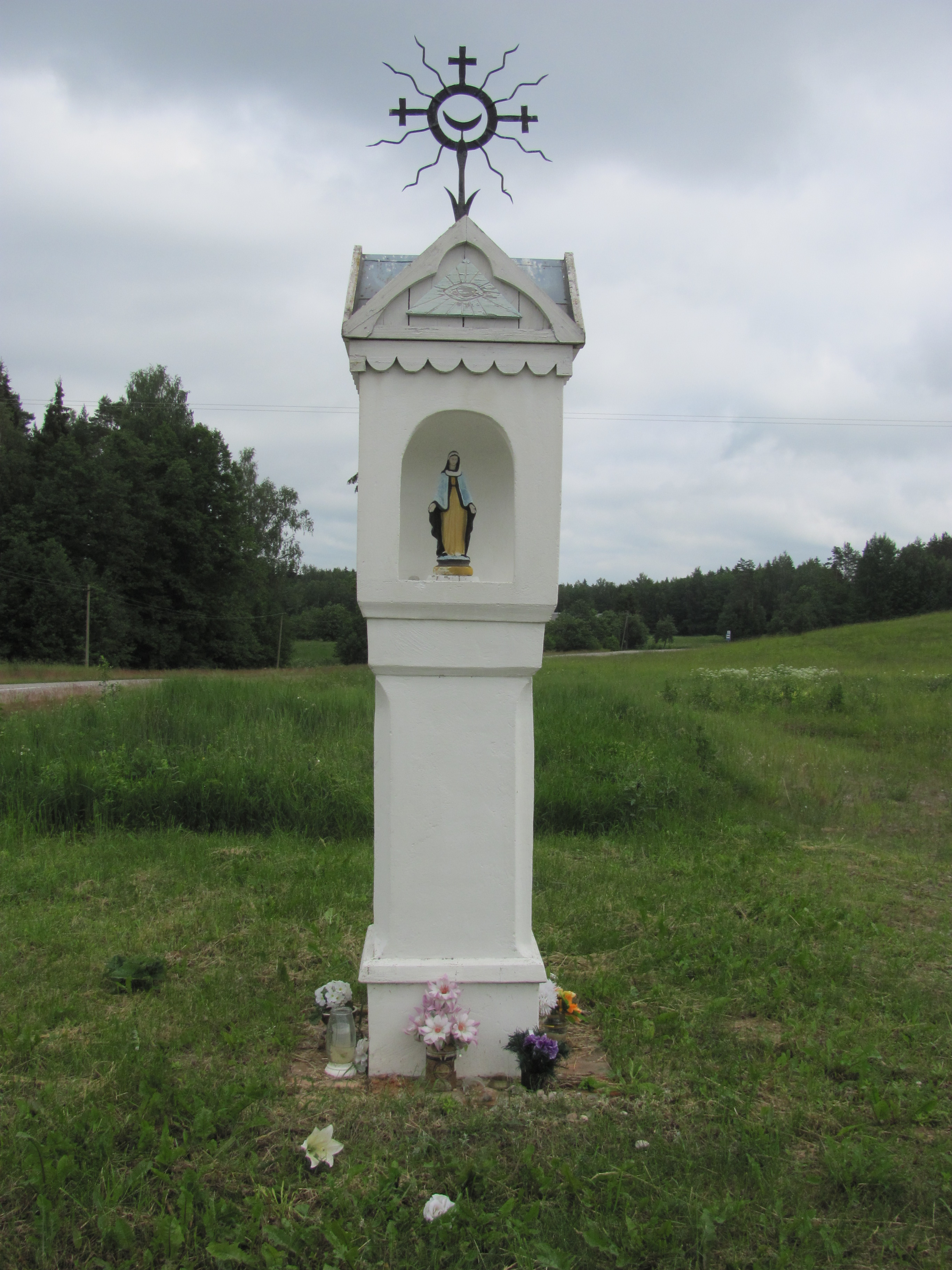 Dusetų sen., Lithuania